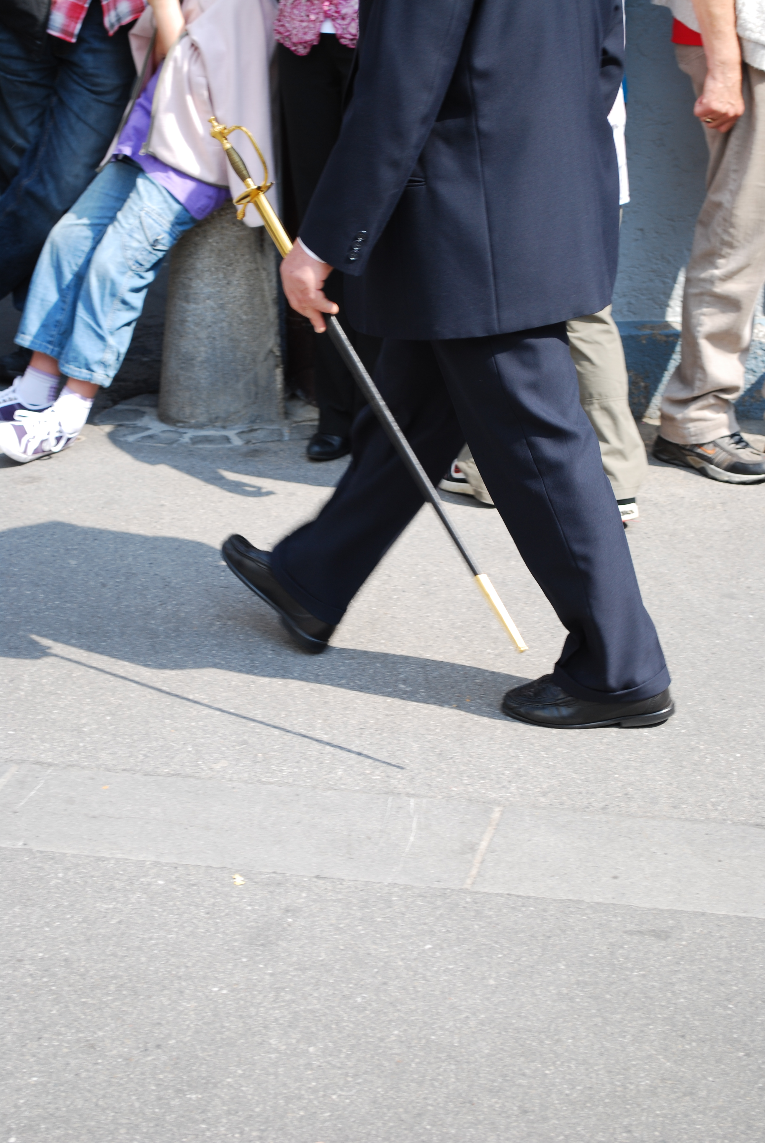 Die traditionelle „Zutrittskarte“ zum Ring an der Landsgemeinde in Appenzell: Der Degen.